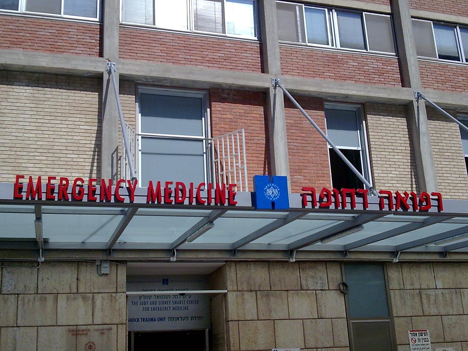 חדר מיון בהדסה עין כרם